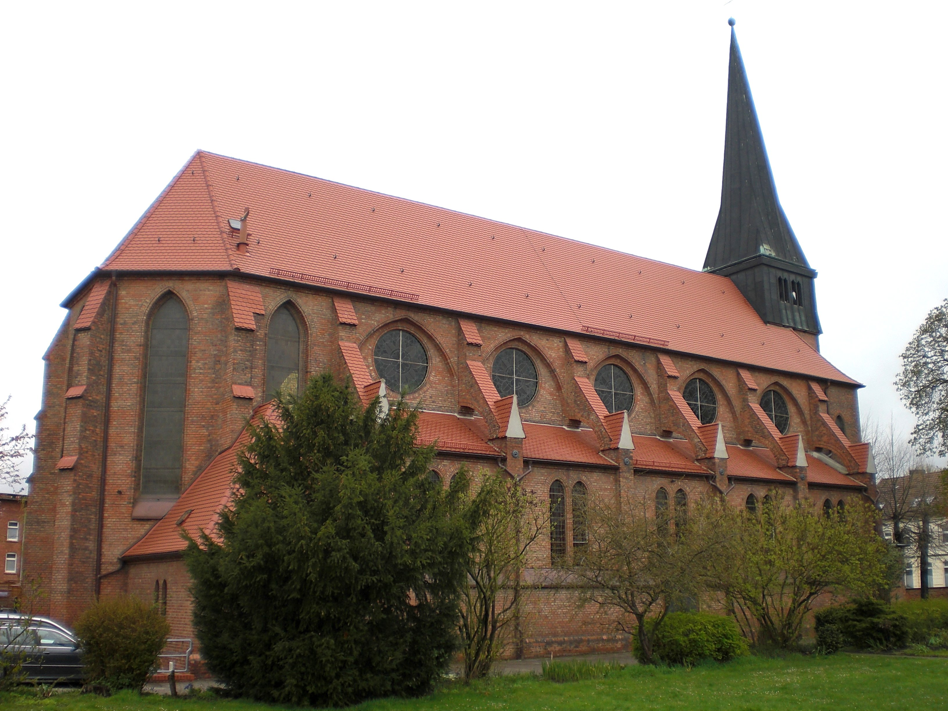 Sankt-Mariae-Kirche in Oschersleben